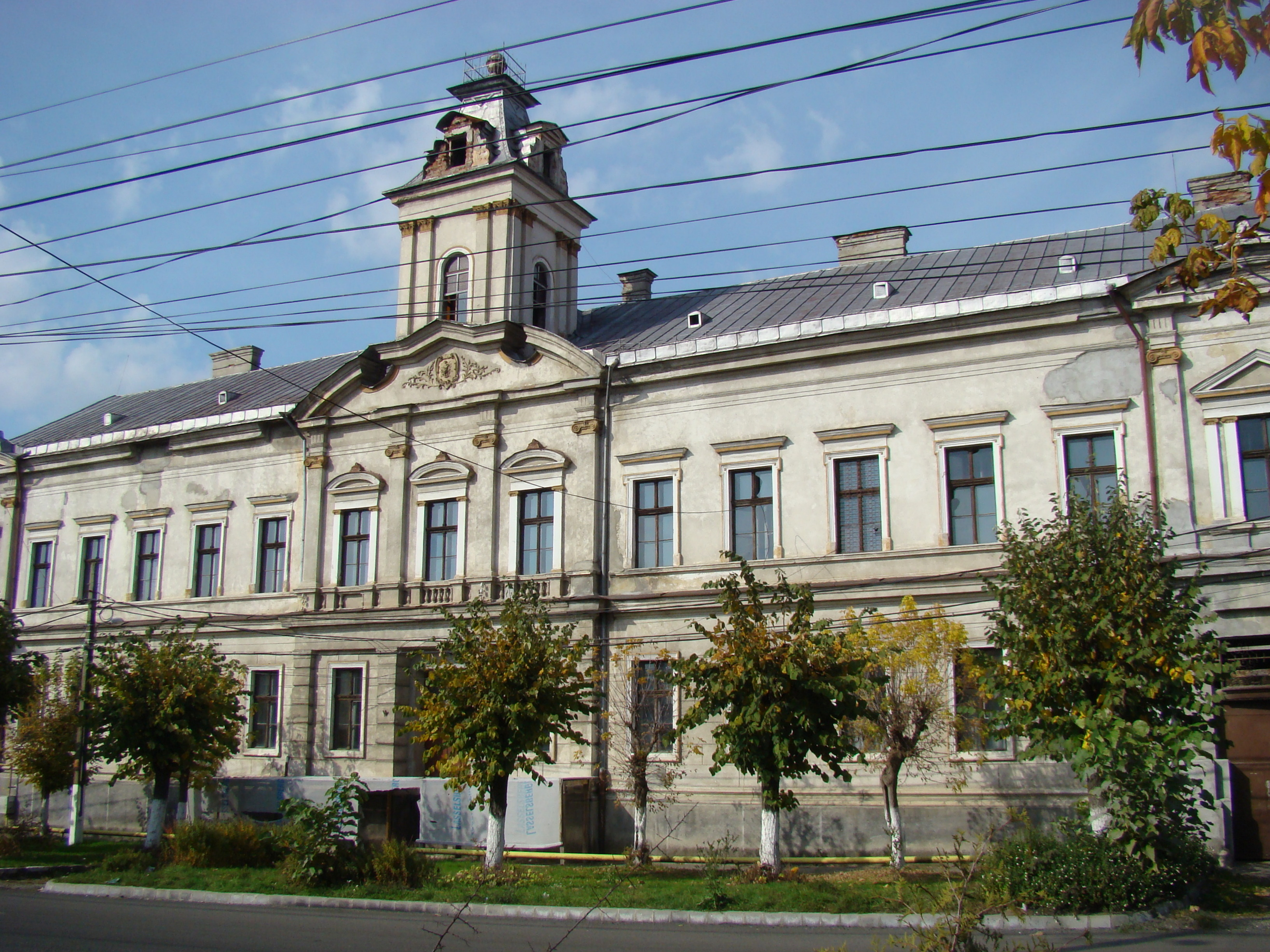 Școala generală nr. 1 Baia Sprie, Str. Săsar 21